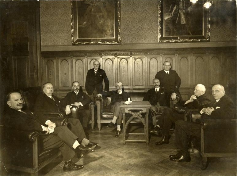 El Gobierno de Gyula Károlyi: János Mayer, Béla Kenéz (Comercio), Béla Ivády (Agricultura), Ferenc Keresztes Fischer (Interior), Gyula Károlyi (presidente), Tibor Zsitvay Tibor (Justicia), Gyula Gömbös (Defensa), Sándor Ernszt Sándor (Cultura) y Lajos Walkó (Relaciones Exteriores).